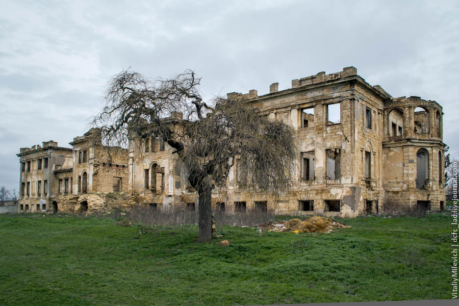 Садиба Дубицького, с. Василівка